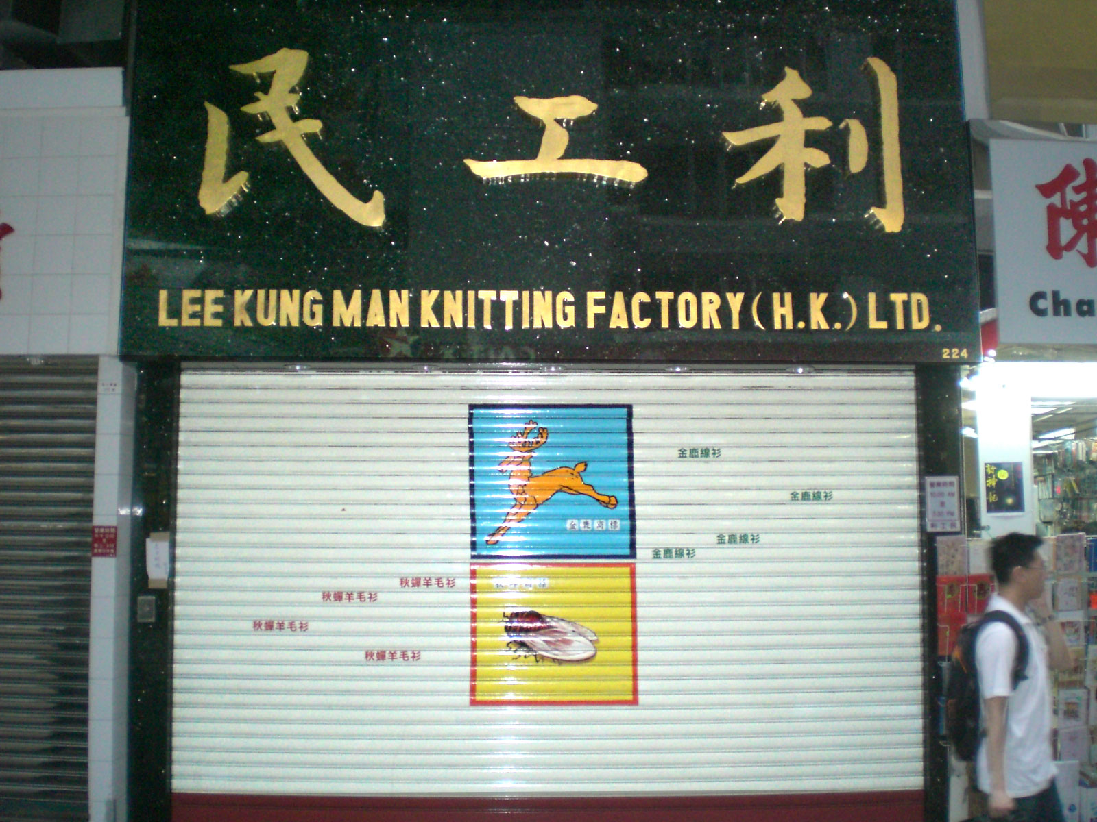 灣仔莊士敦道利工民分店